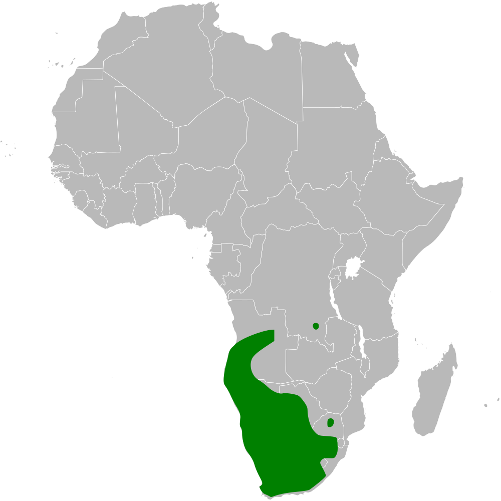 Chersomanes albofasciata distribution map based on